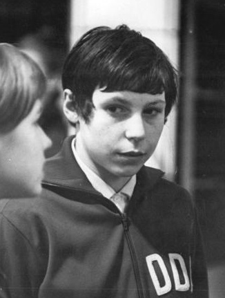 Karin Tülling